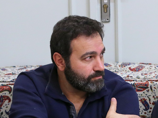 آرش مجیدی در دیدار جمعی از برنامه‌سازان سیما با سید علی خامنه‌ای